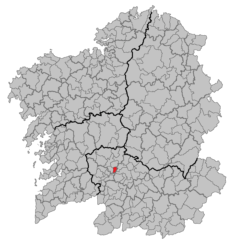 Mapa coa localización do concello de Punxín.